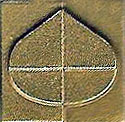 Leistungsabzeichen